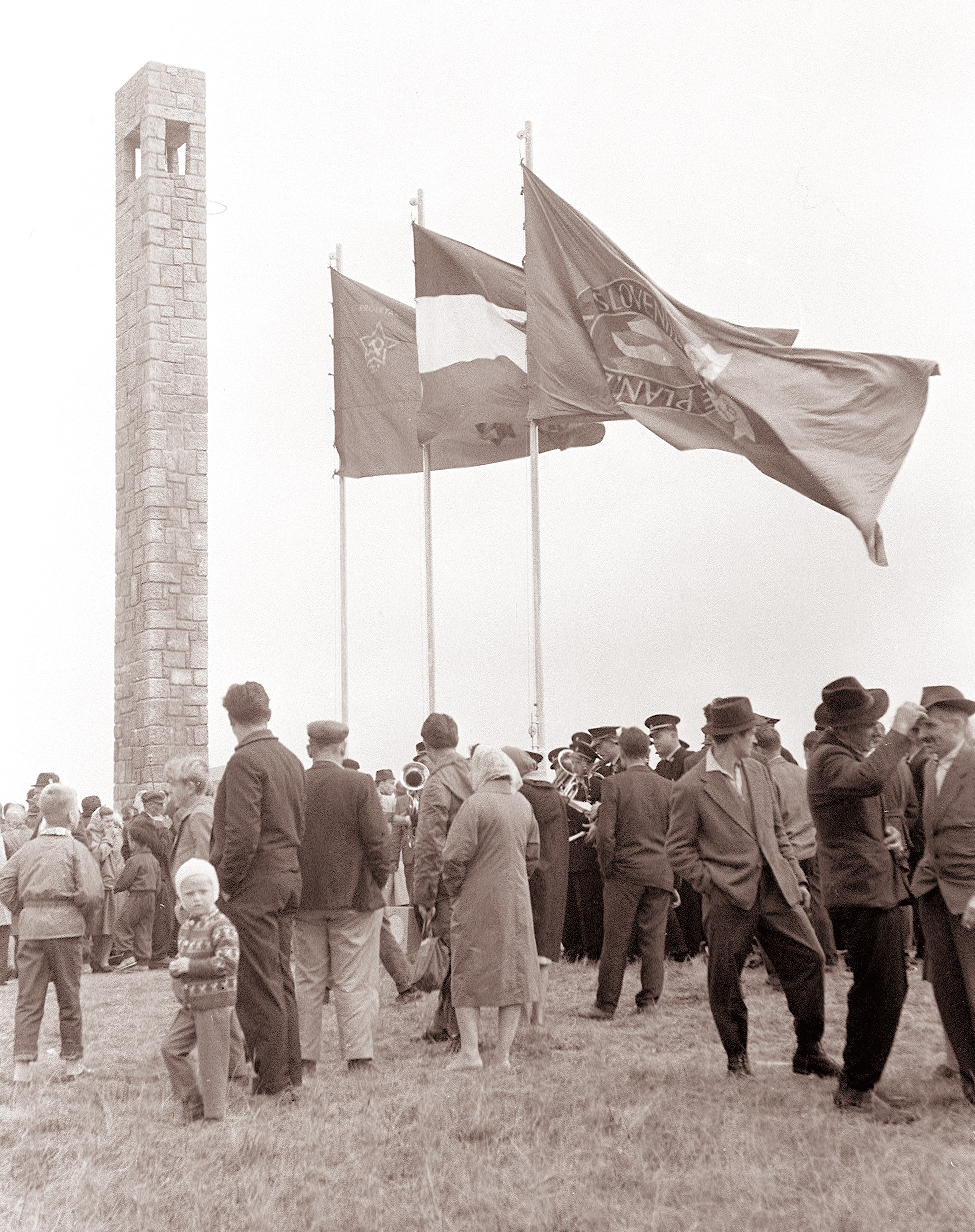 Slavnost ob spomeniku na Jezerskem vrhu